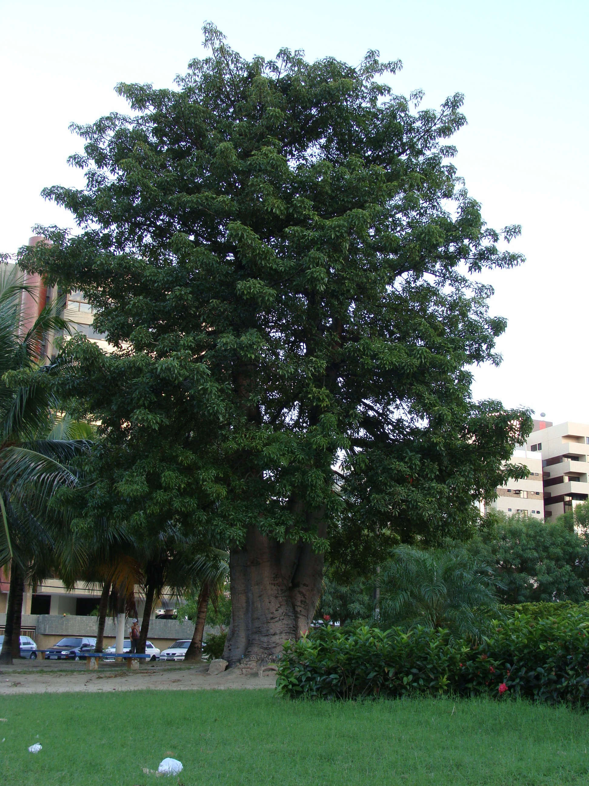 Baobá na Pça do Skate em Maceió, Alagoas, Brasil